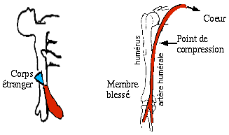 Point de compression huméral (sur la face interne du bras) : avec le pouce, comprimer l'artère humérale contre l'humérus